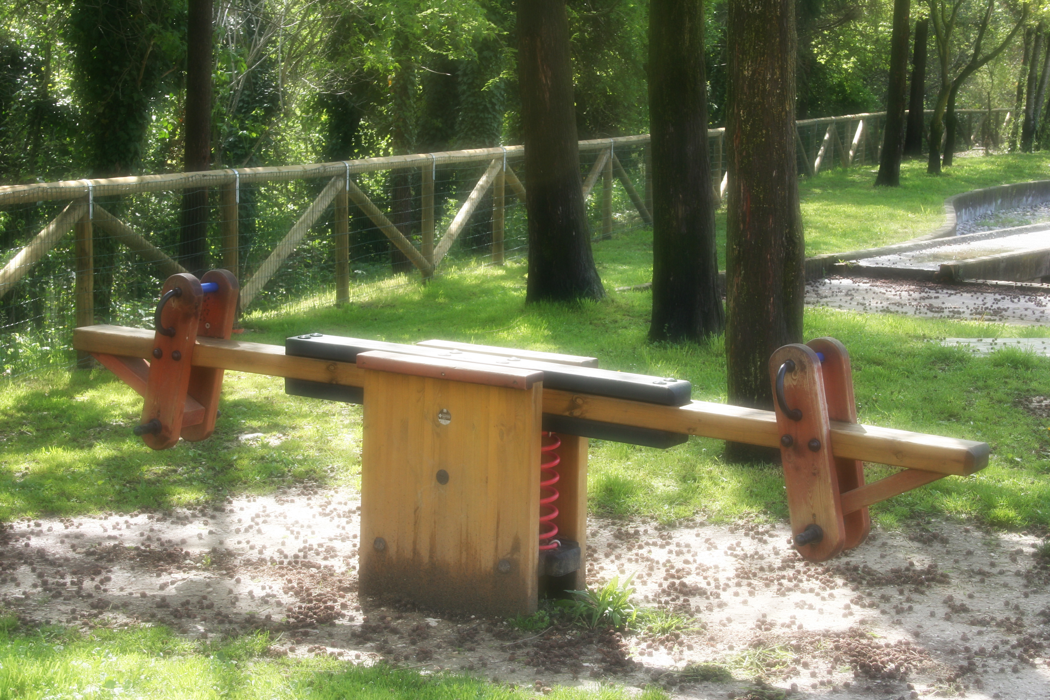 moderne Wippe aus Holz.